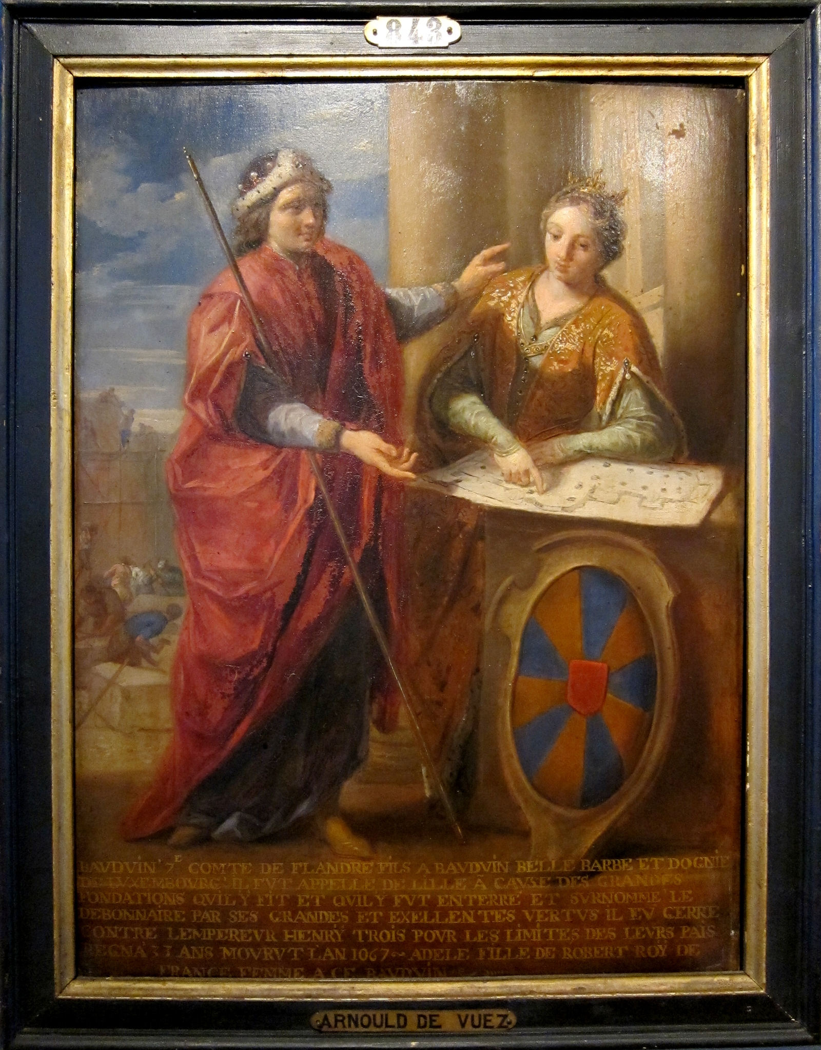 Baudouin VII et Adèle de France